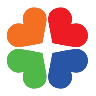 本圖片為高雄市左營區新光國民小學之校徽。